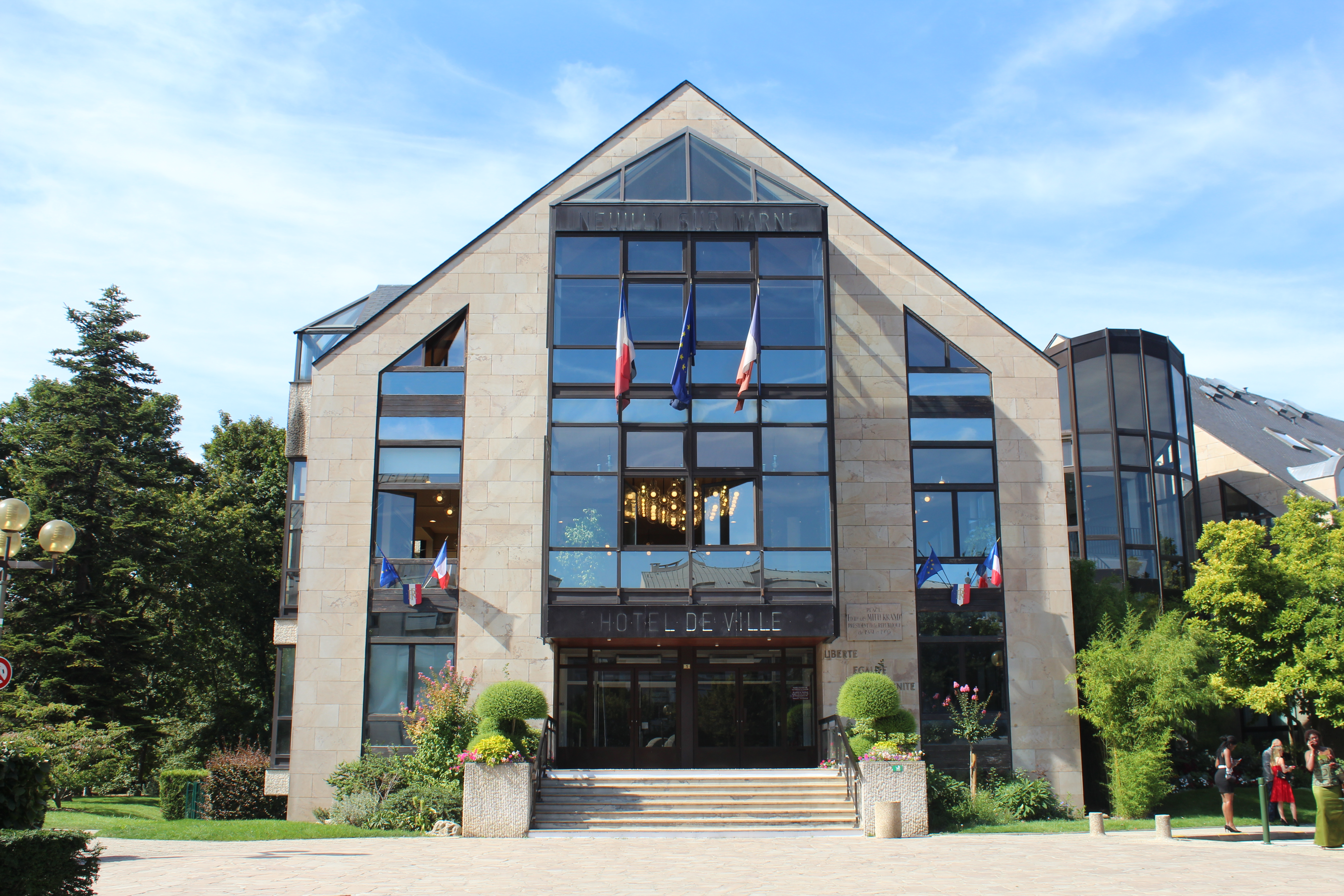 Mairie de Neuilly-sur-Marne.